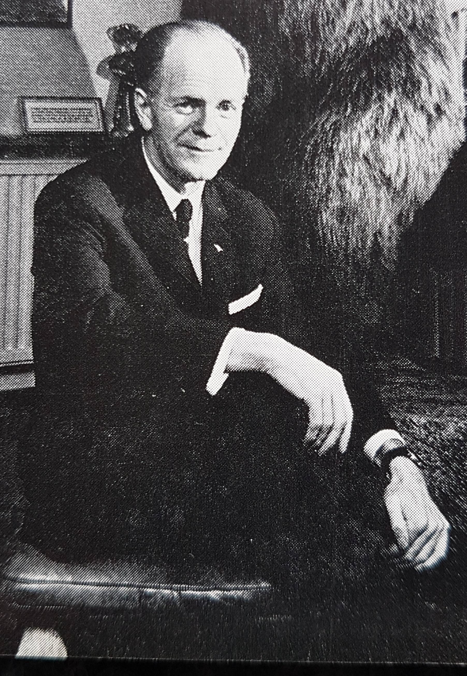 Knut Hagrup SAS